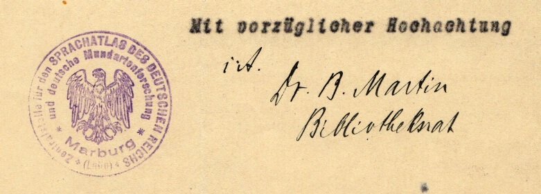 Unterschrift von Bernhard Martin in einem Brief vom 18. März 1933 an das Eidgenössische Departement des Innern (Archiv des Schweizerischen Idiotikons)